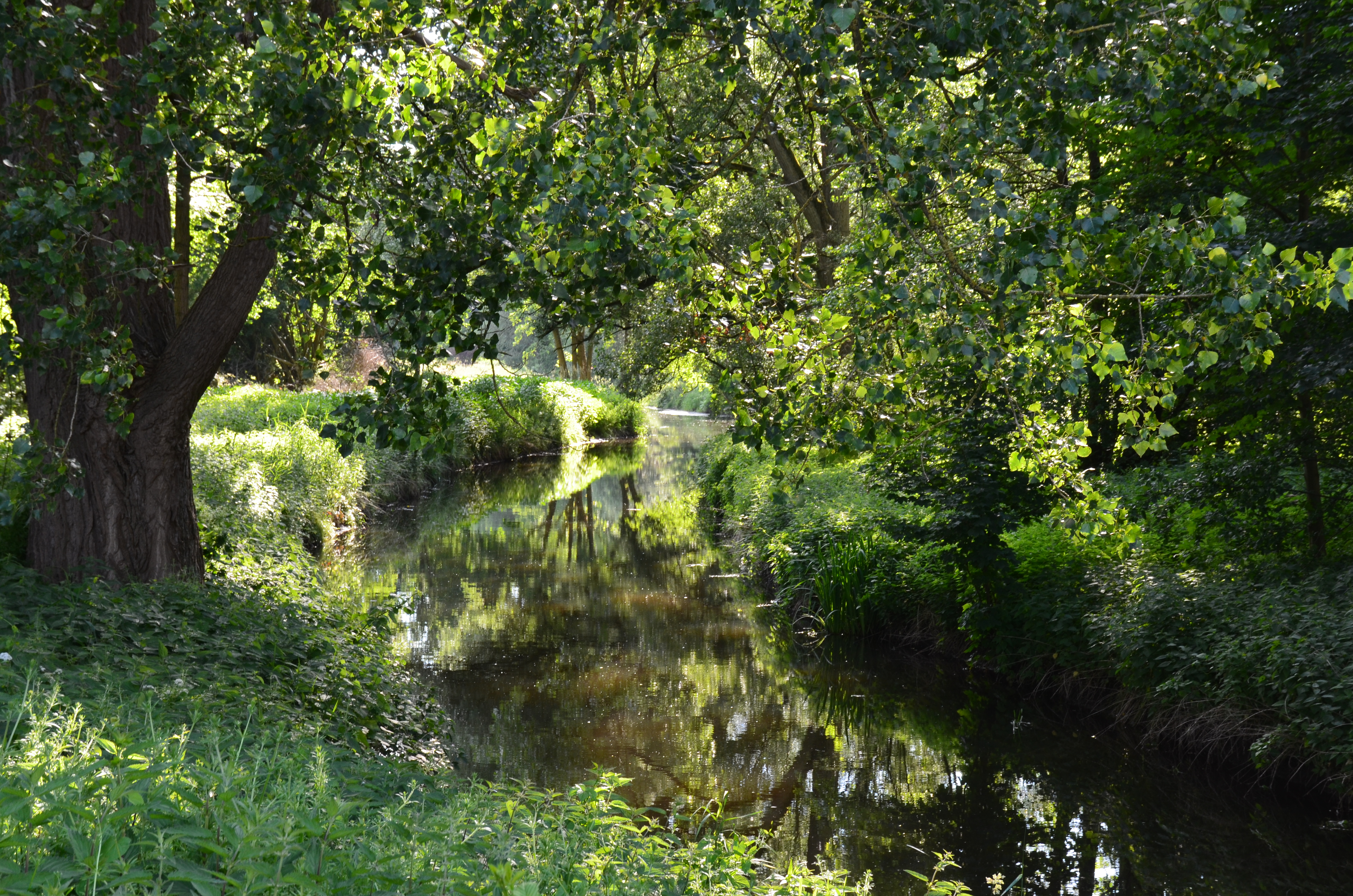 Die Aue in Harsefeld; Blickrichtung entgegen Fließrichtung